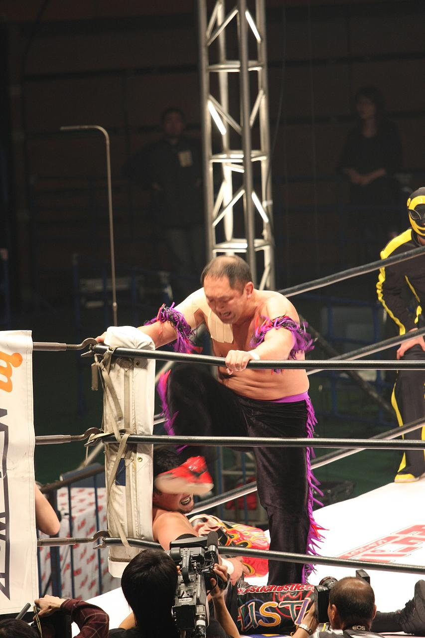 Shinjiro Otani stomping on Tajiri